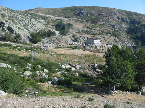 Station de ski de Ghisoni-Capanelle